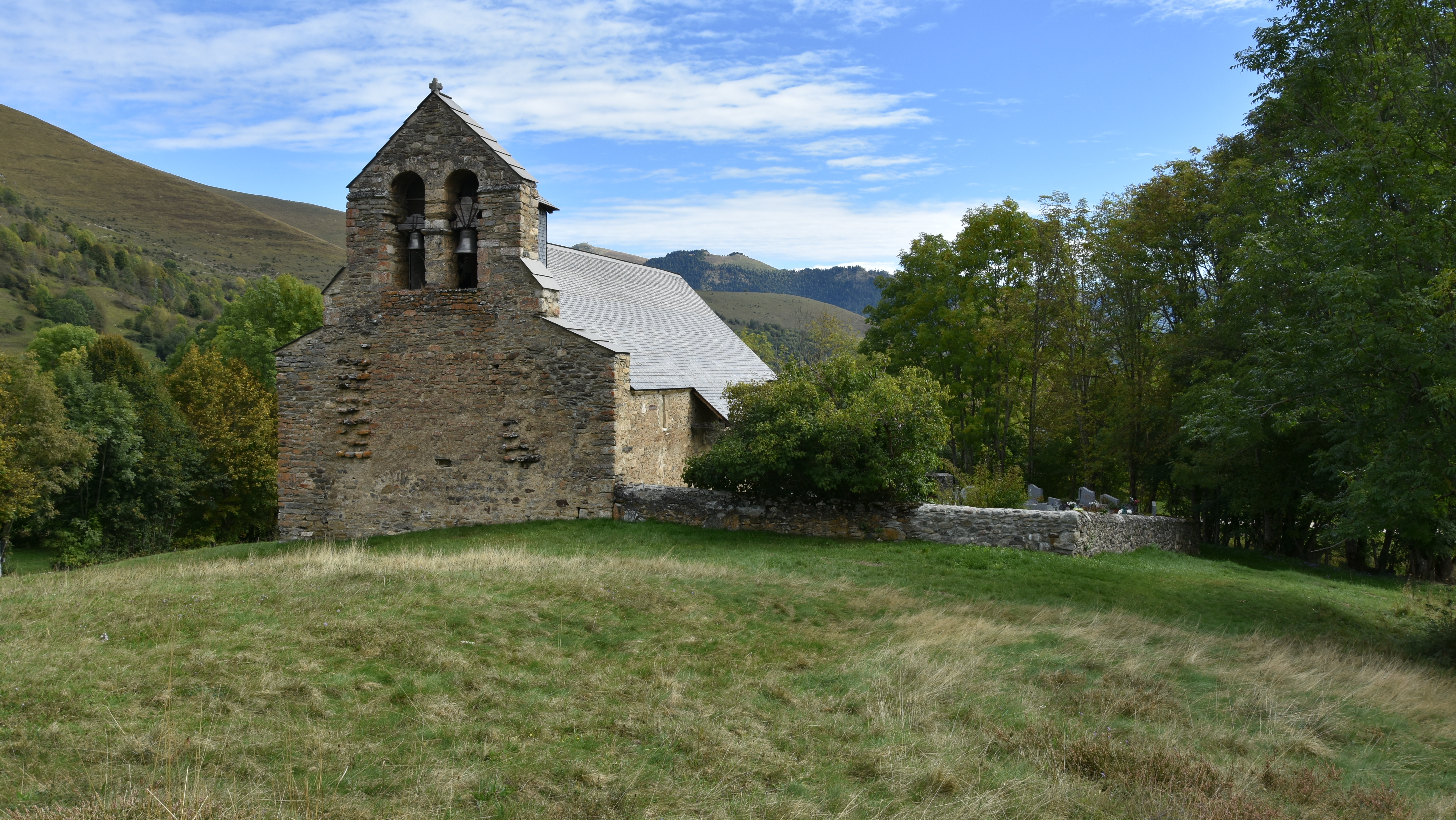 Chapelle Saint-Pé de la Moraine Garin